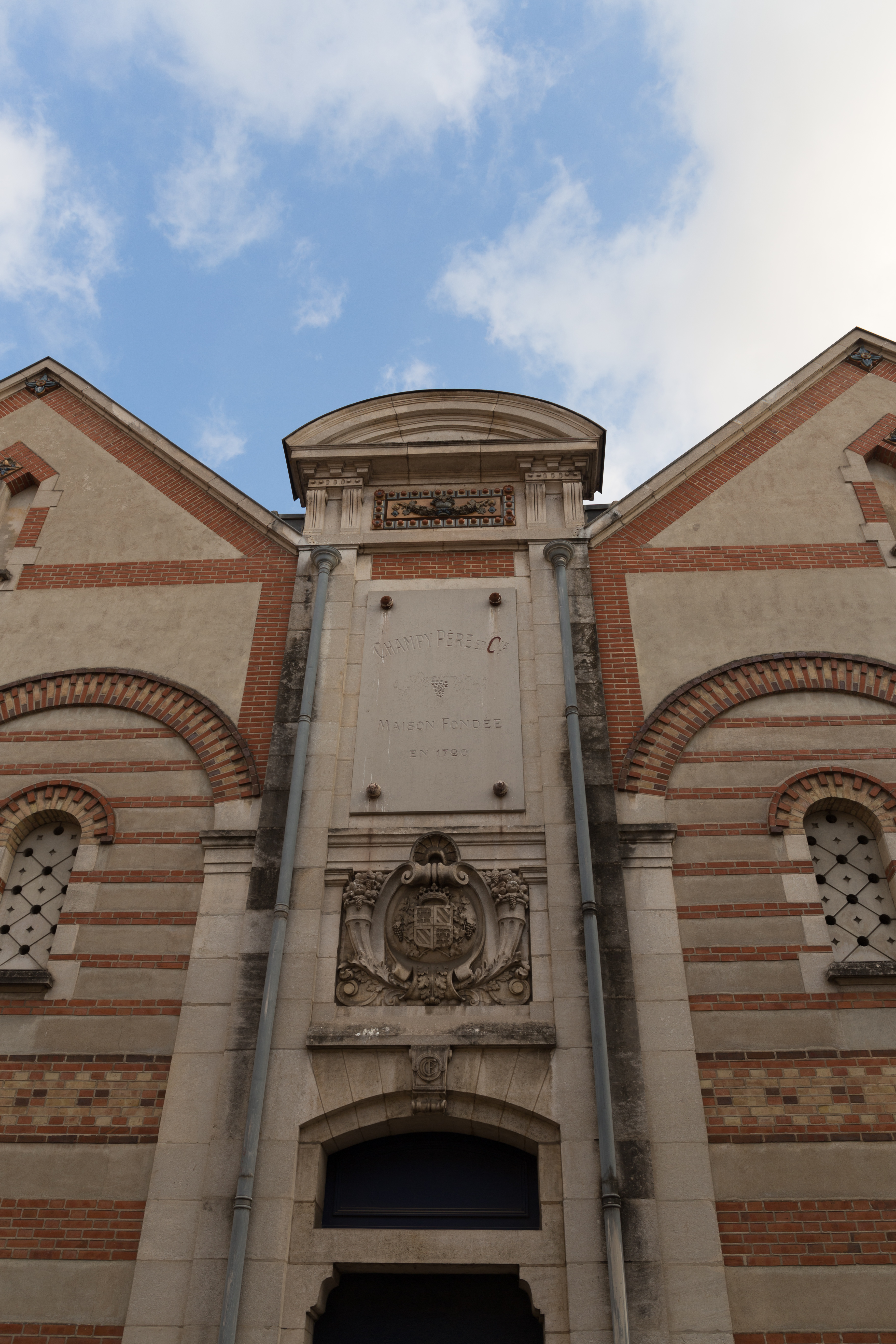 Maison de négoce Champy à Beaune.